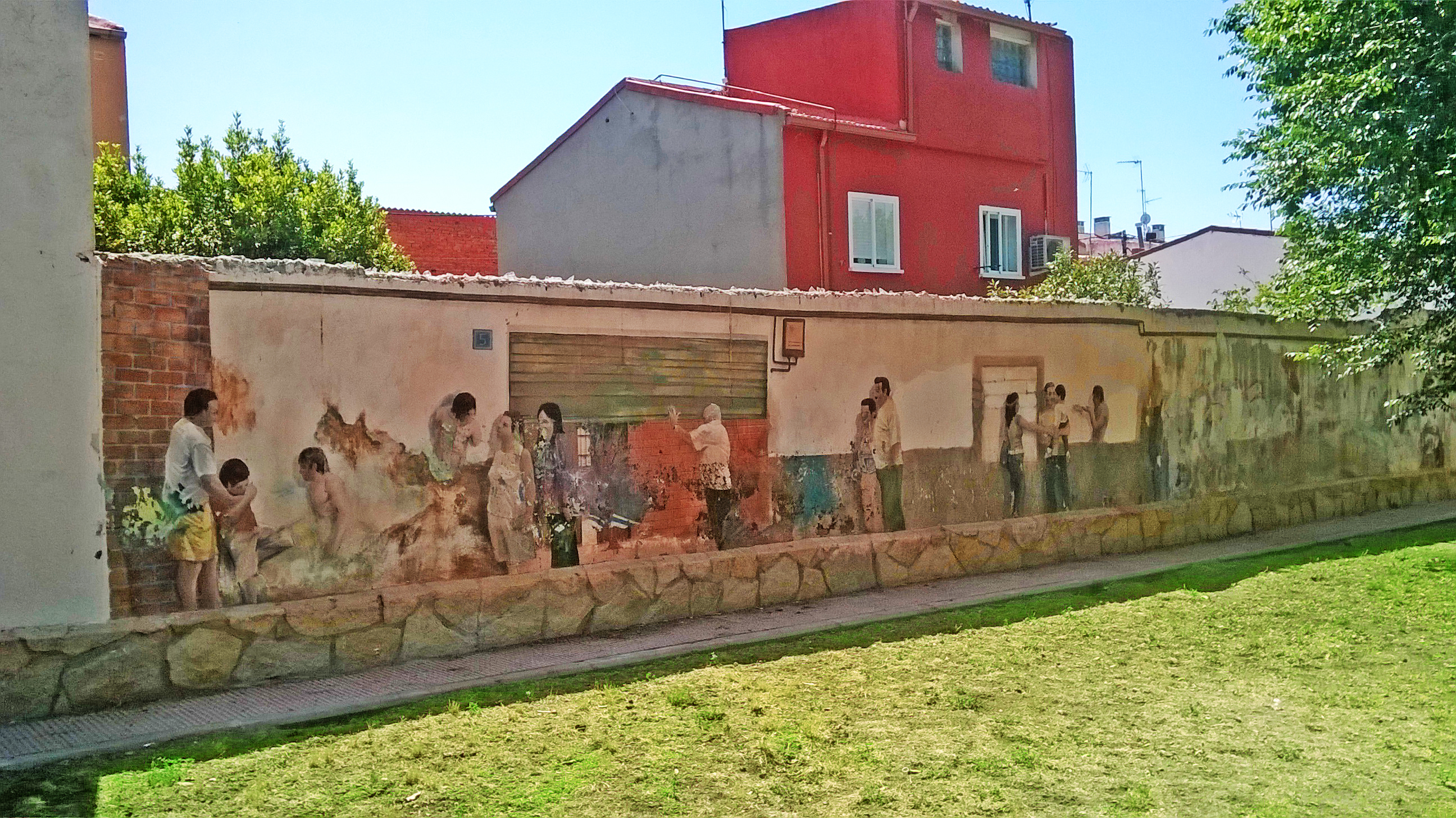 Antiguas fachadas Parque de la Amistad de Parla, pintura representación de casa y personas